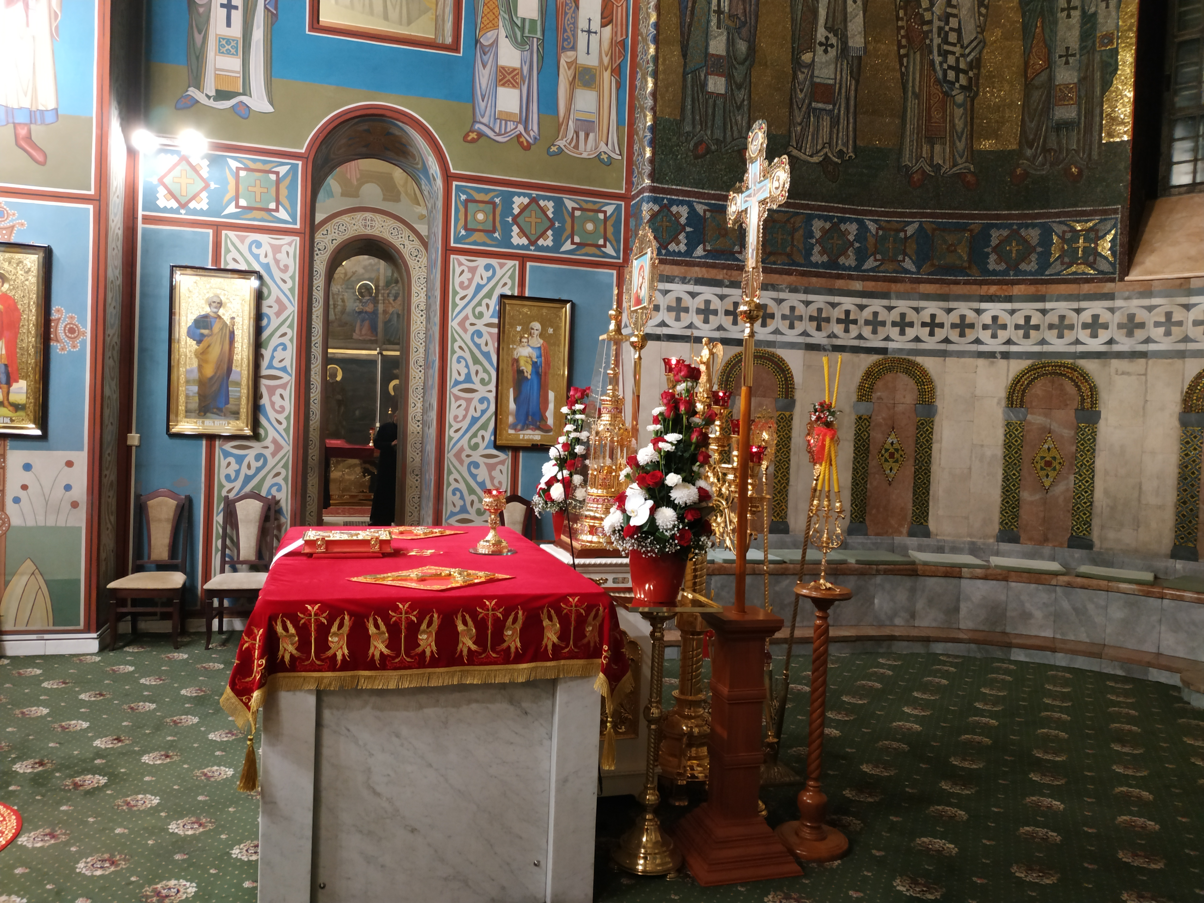 вівтар в Михайлівському золотоверхому монастирі.